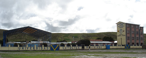 UAC Batallas